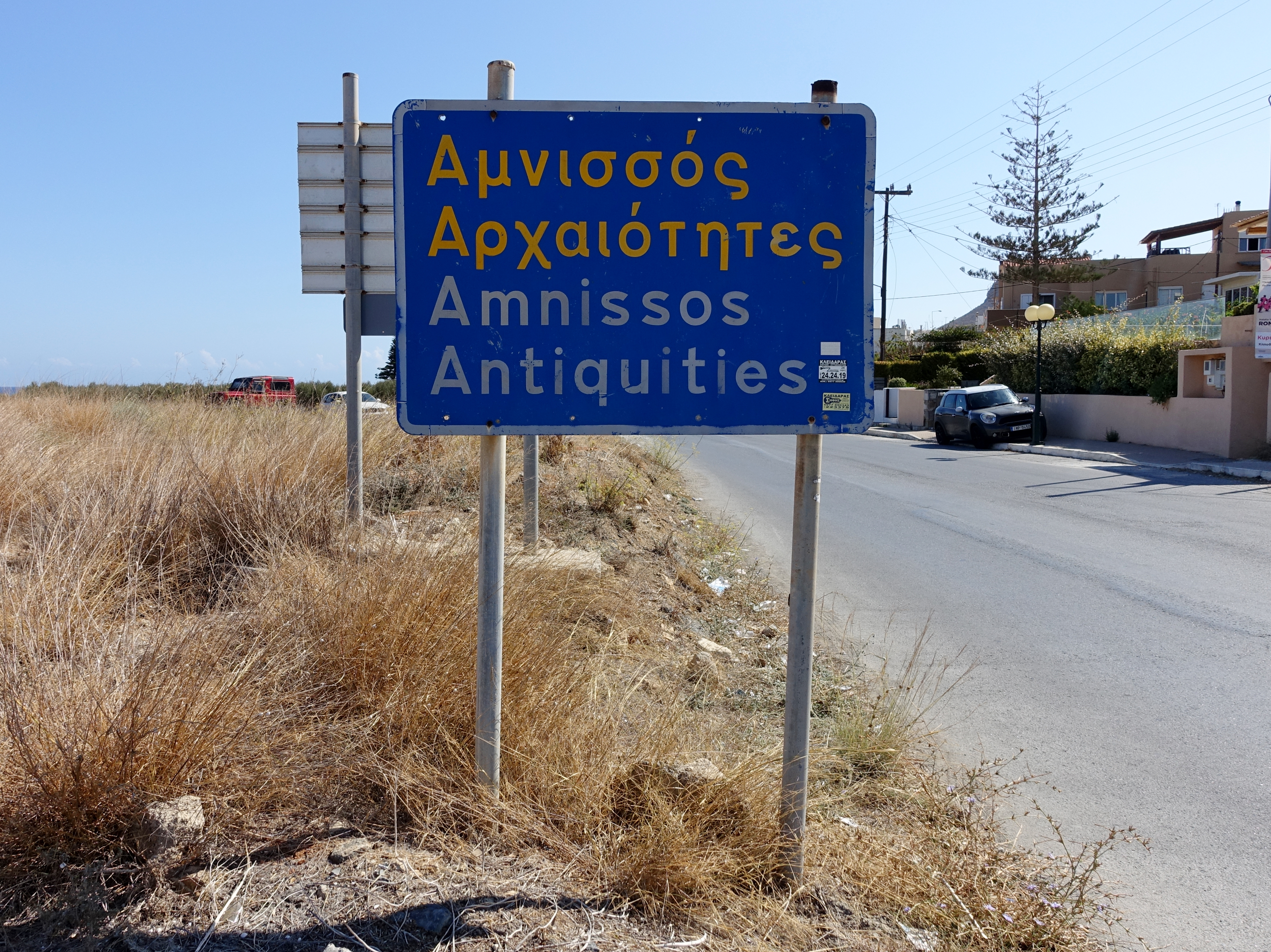 Hinweisschild in Amnissos bei Iraklio, Kreta, Griechenland